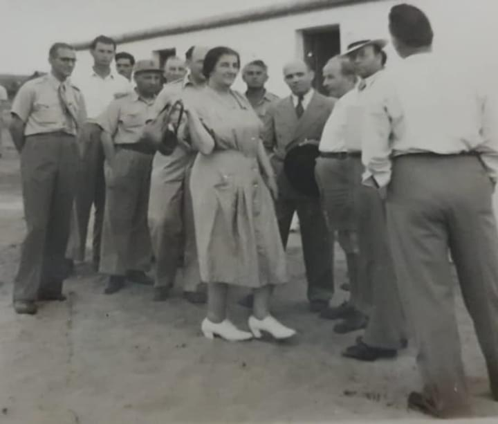 מנדלבליט (רביעי מימין) בסיור עם גולדה מאיר (מרכז)